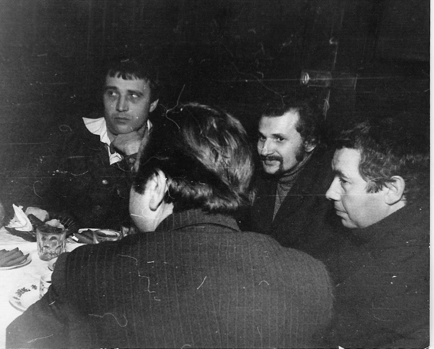 Interior